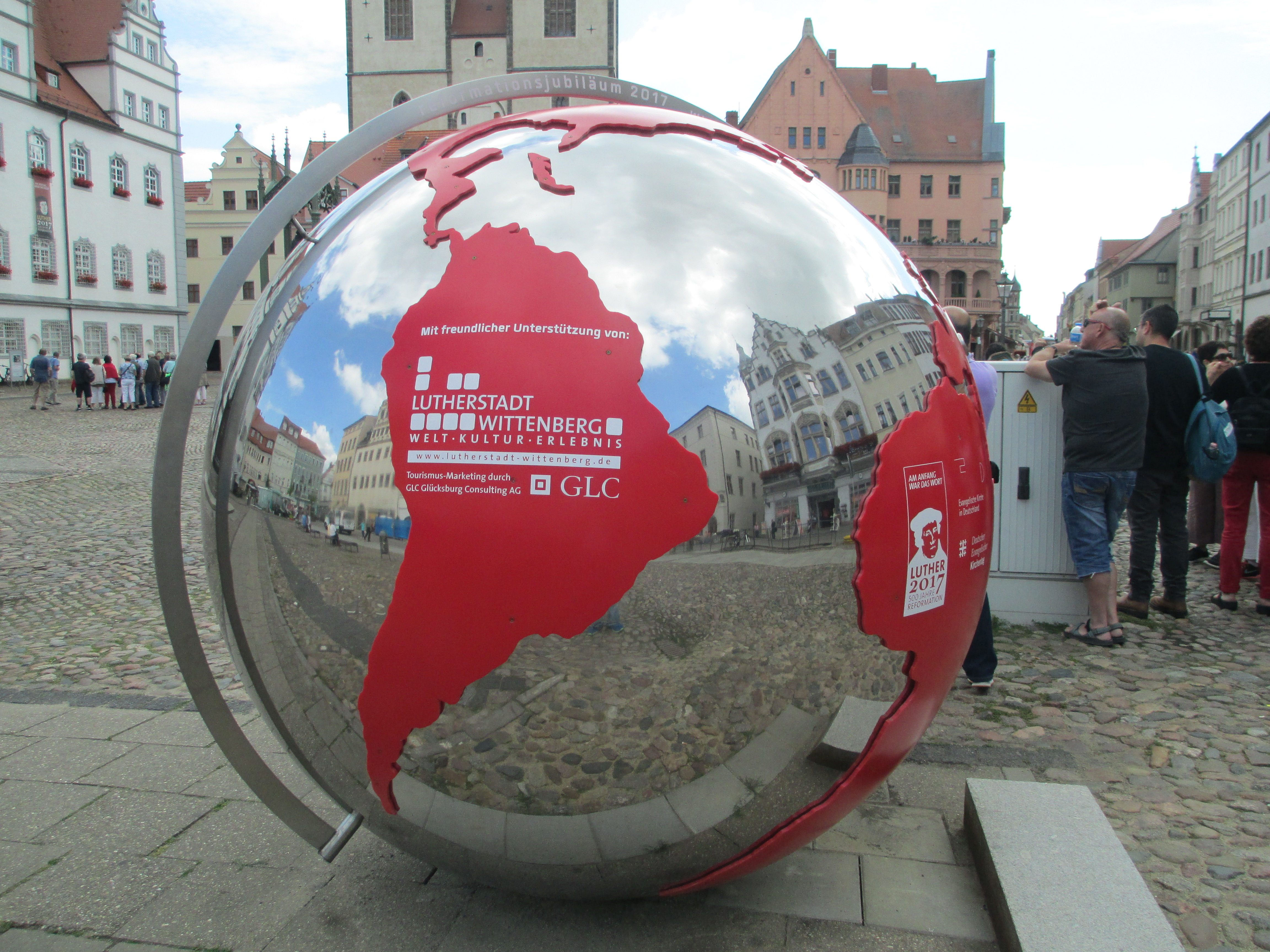 גלובוס הרפורמציה בוויטנברג